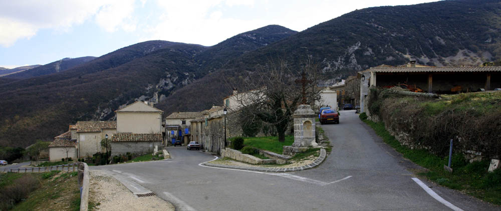 Village of le Castellet-en-Luberon, Vaucluse, France